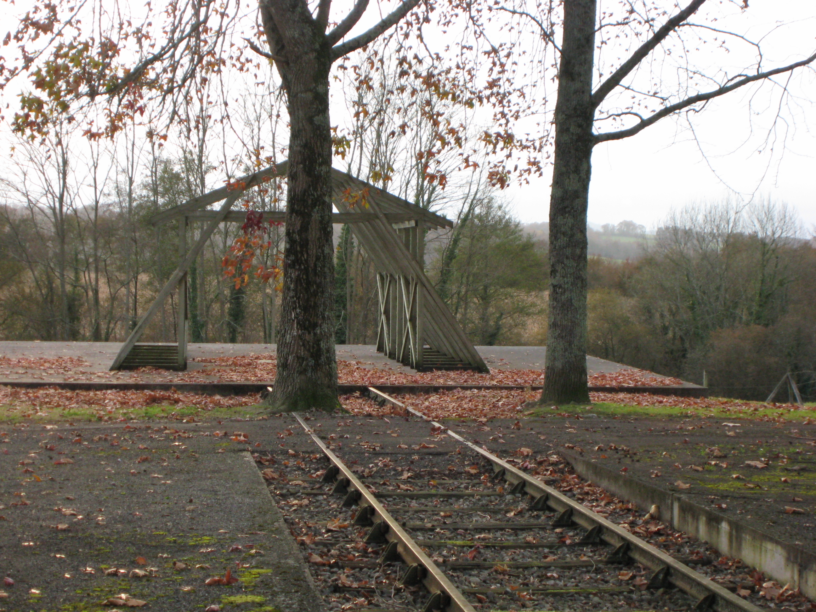 Monument contemporain en guise de voie ferrée symbolisant la déportation du camp de Camp de Gurs, Pyrénées-Atlantiques (Pyrénées)